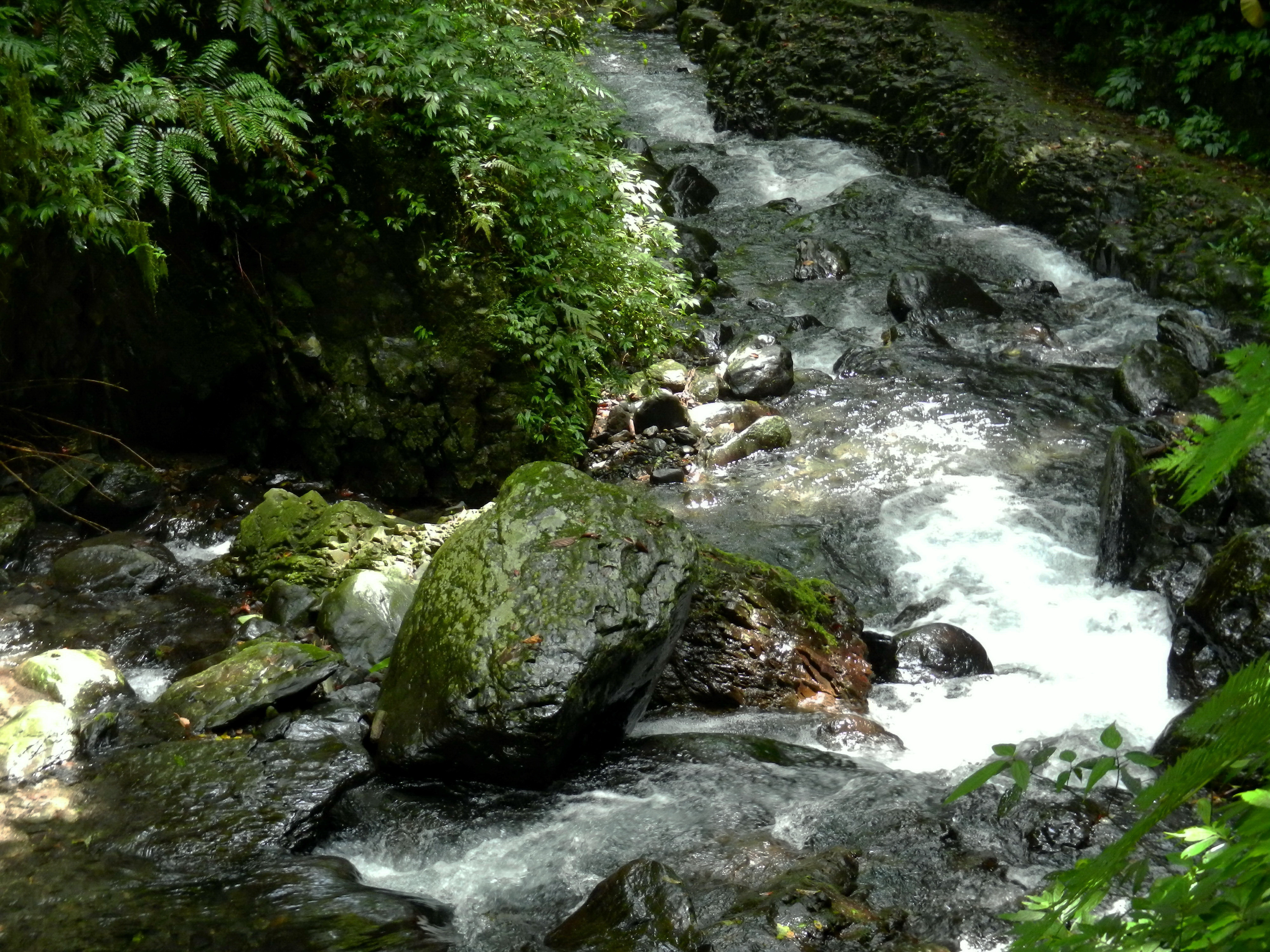 林美溪 Linmei River